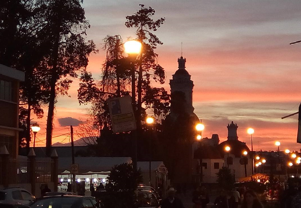 Centro de Santa Ana Chiautempan, Tlaxcala